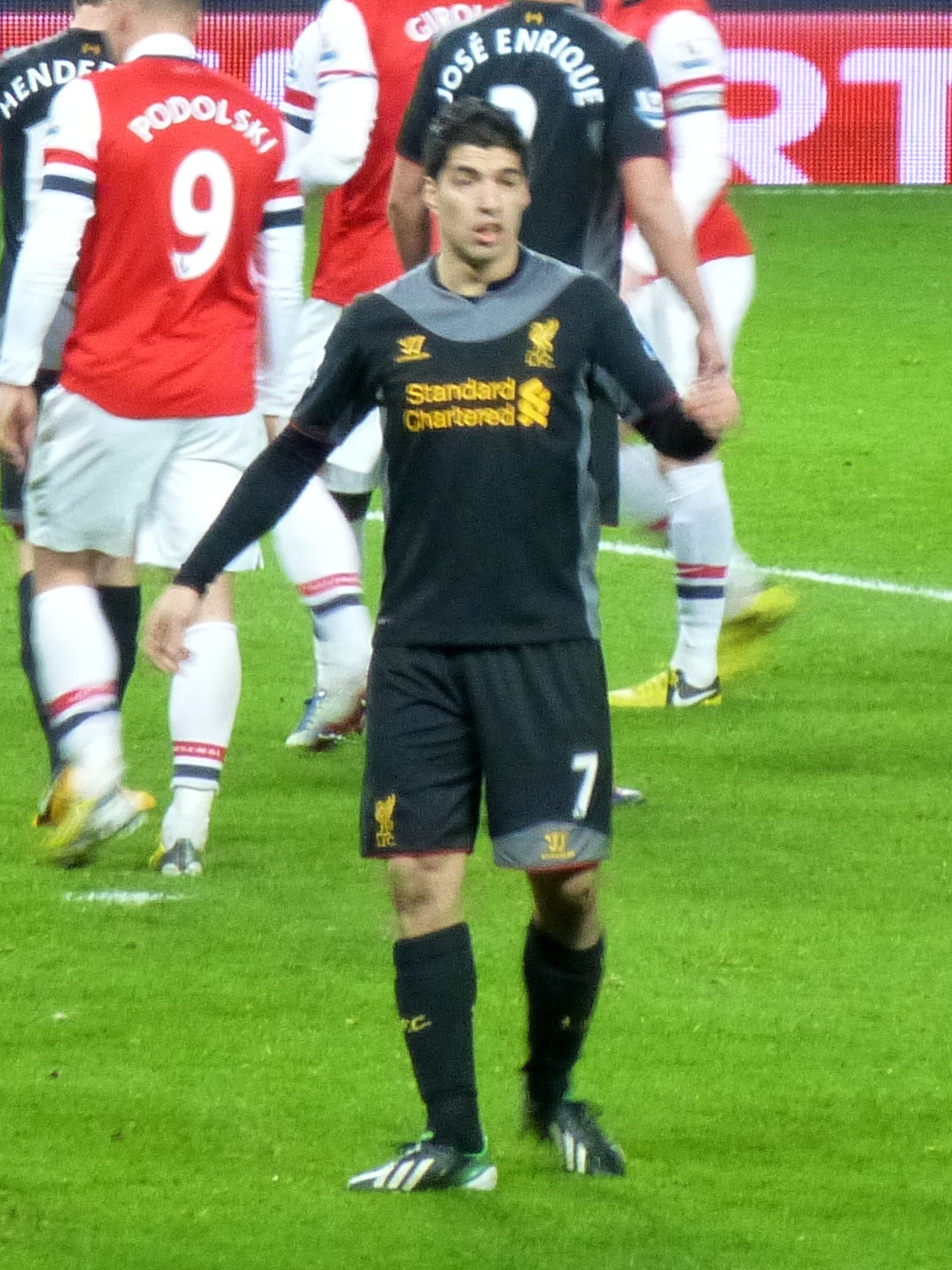 Luis Suarez playing against Arsenal.